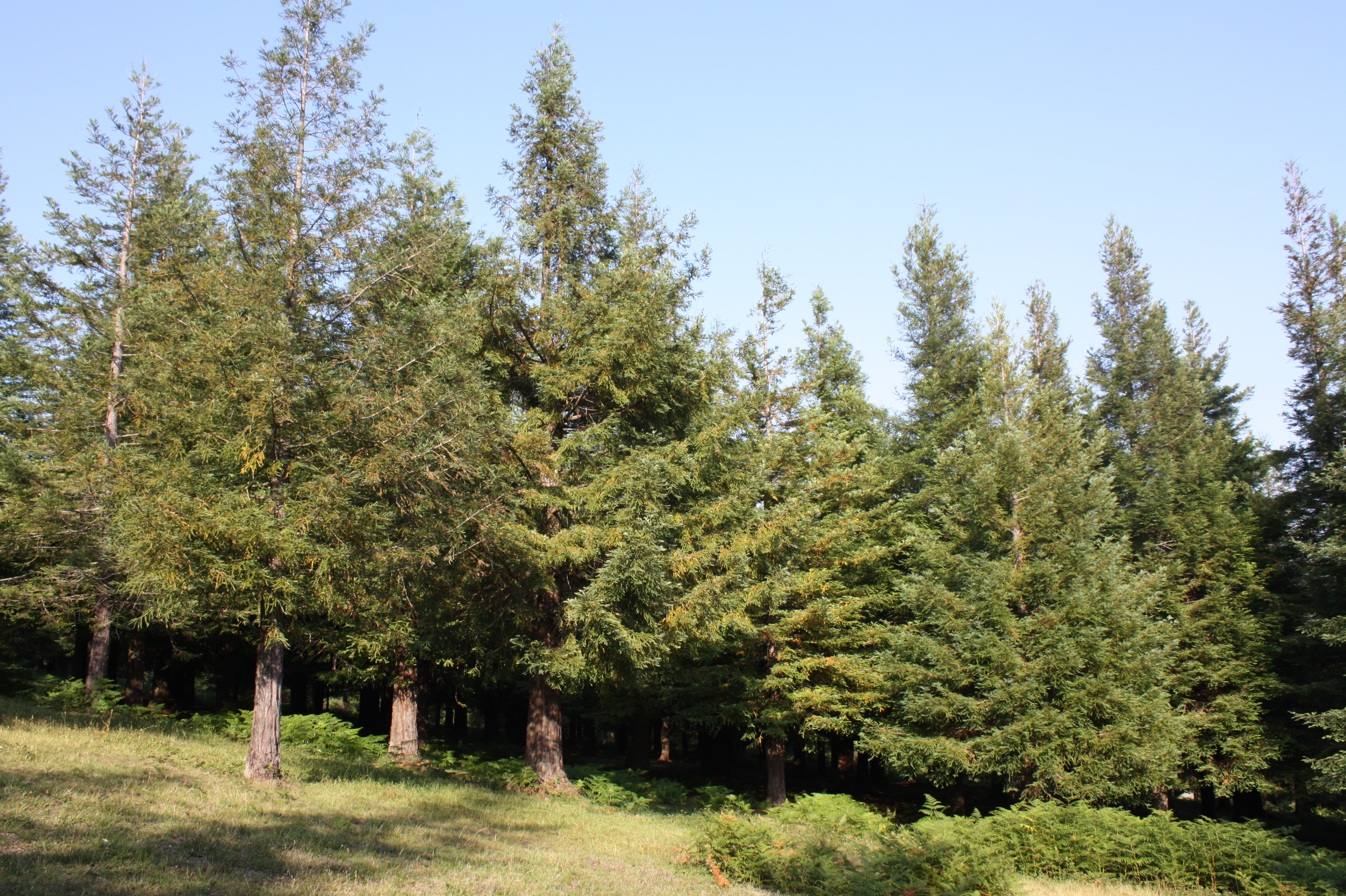 Bosque de sequoias no Monte Castrove (en Poio, Pontevedra). Plantáronse 500 exemplares en 1992, co gallo do 500 aniversario do descubrimento de América.